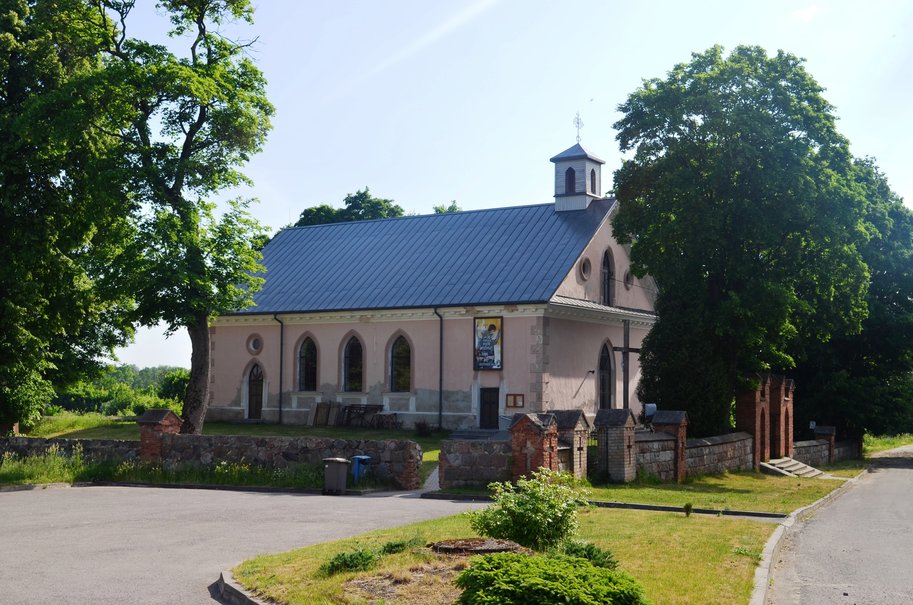 Sužionių bažnyčia, Vilniaus raj.